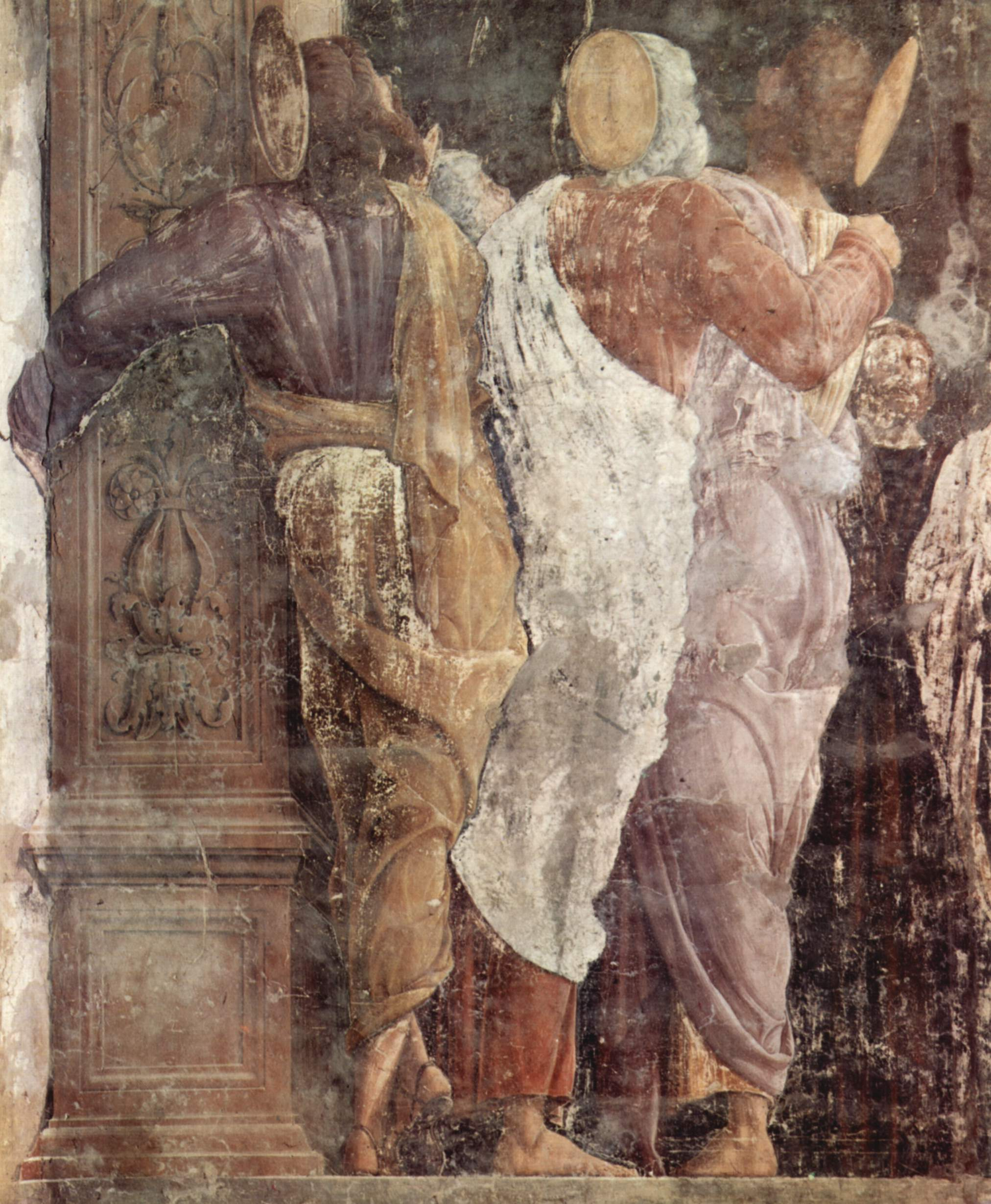 detail: Szene: Maria Verkündigung